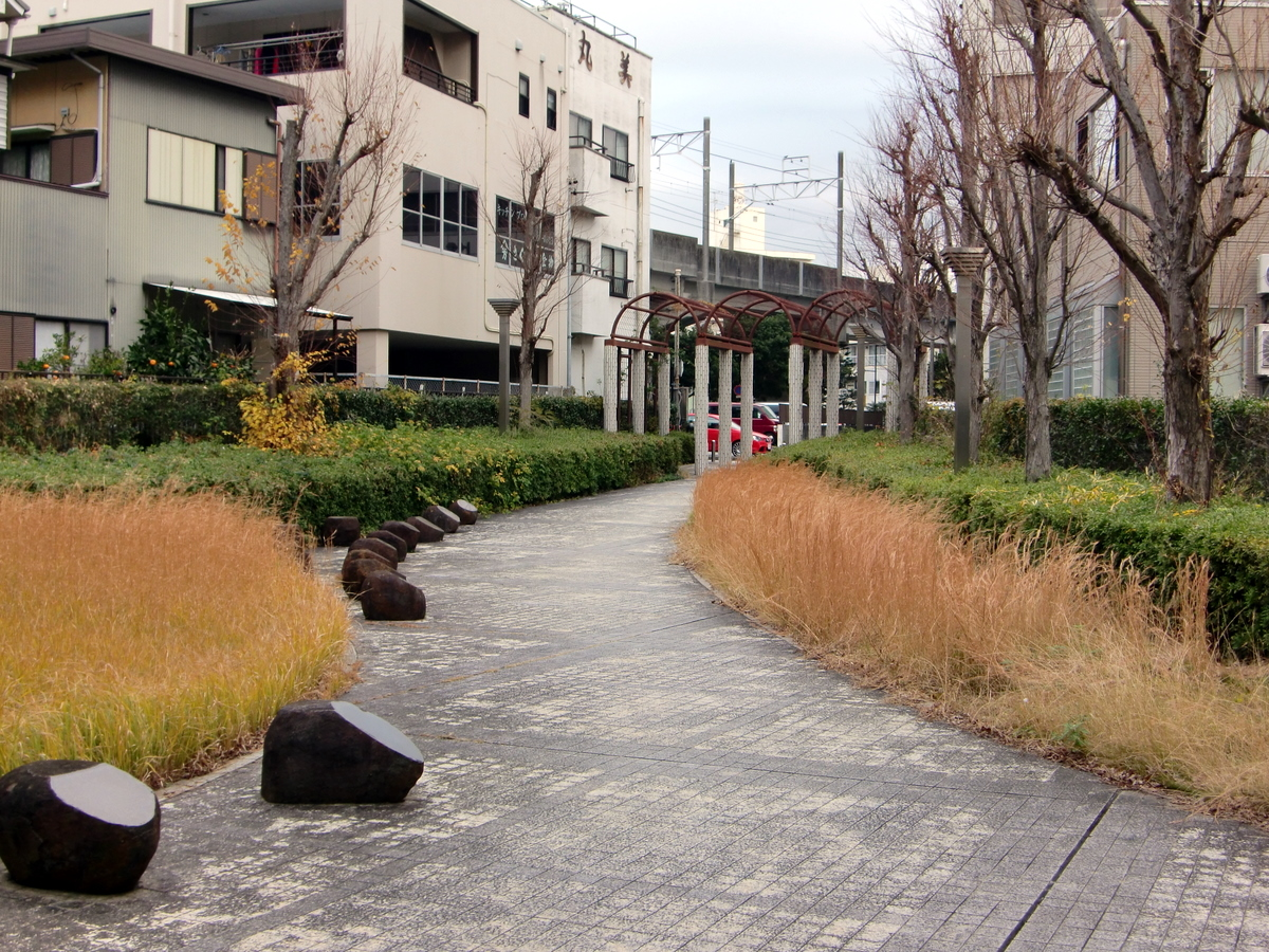 旧遠鉄浜松駅の奥山線線路敷跡